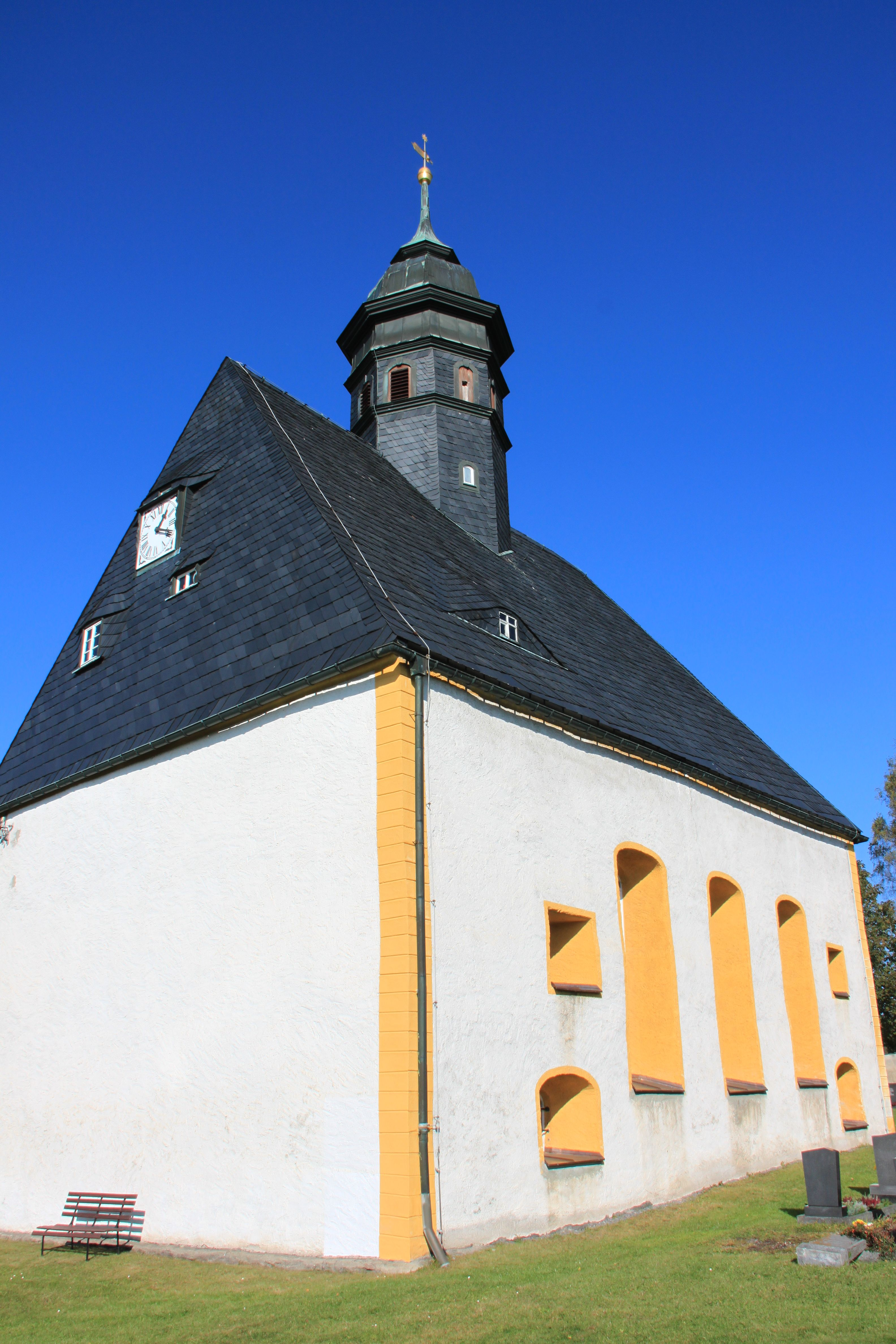 Kirche in Lengefeld OT Lippersdorf im Erzgebirge